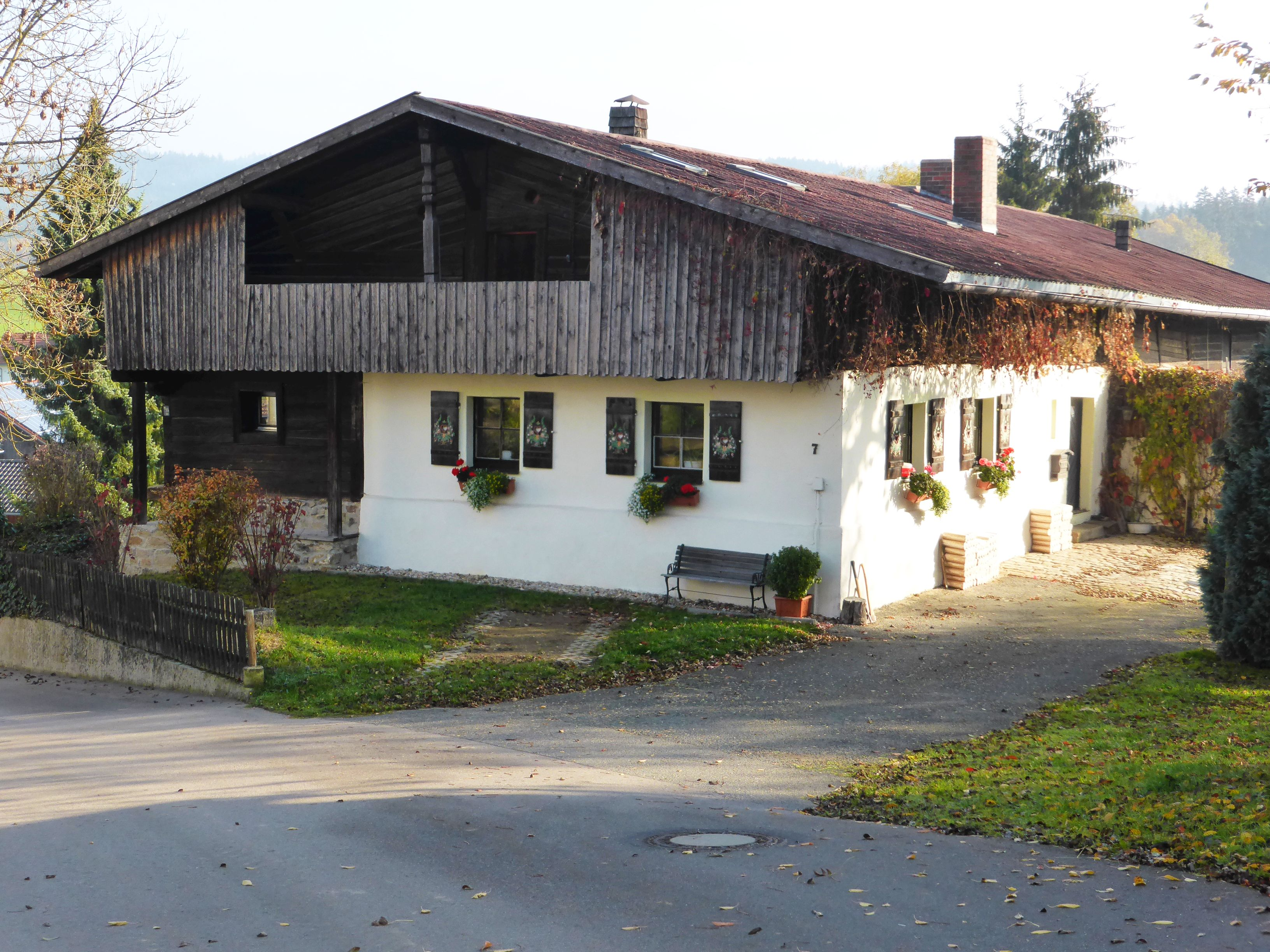 Bauernhaus Kager